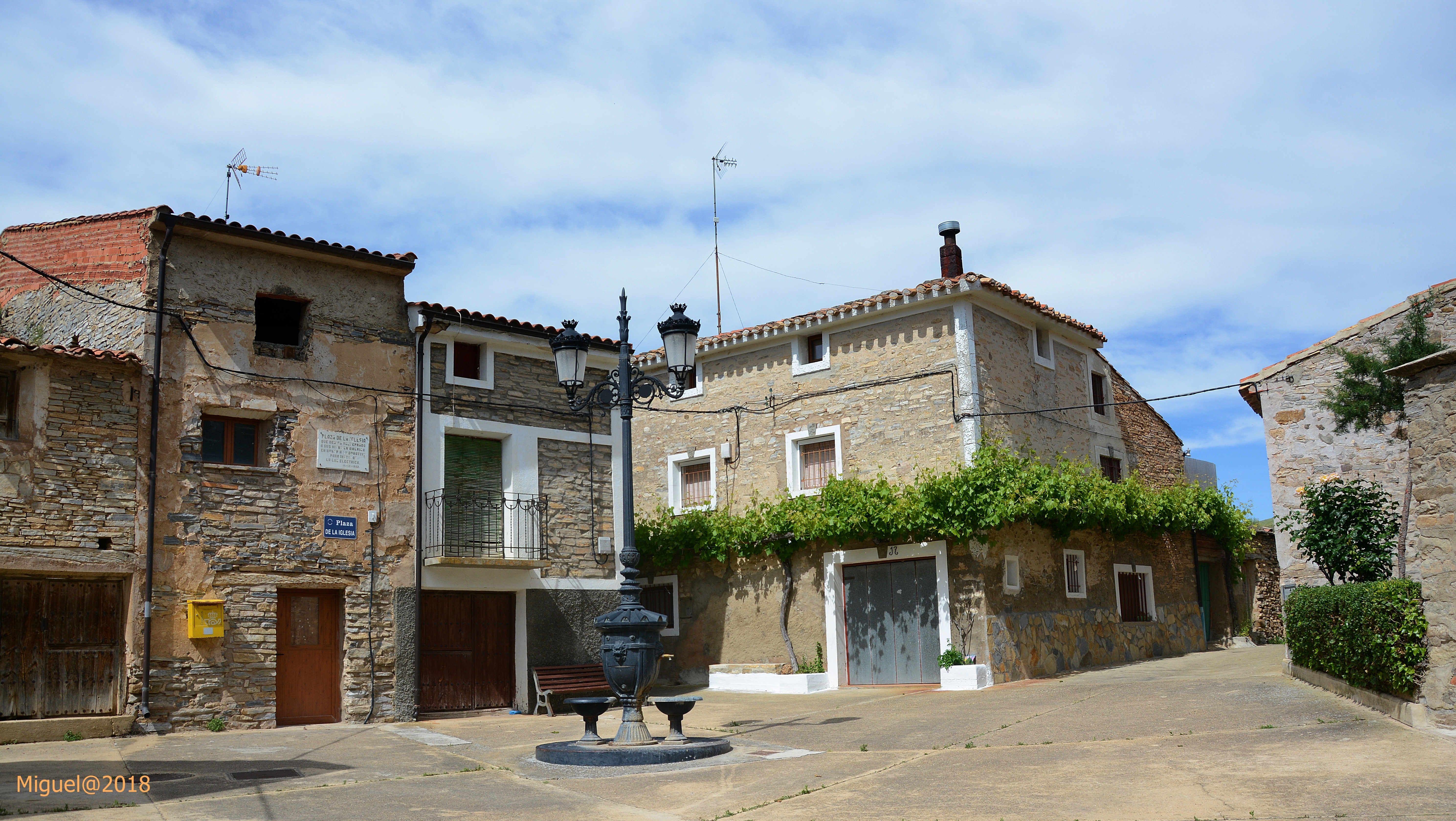 Valdeprado.Soria.